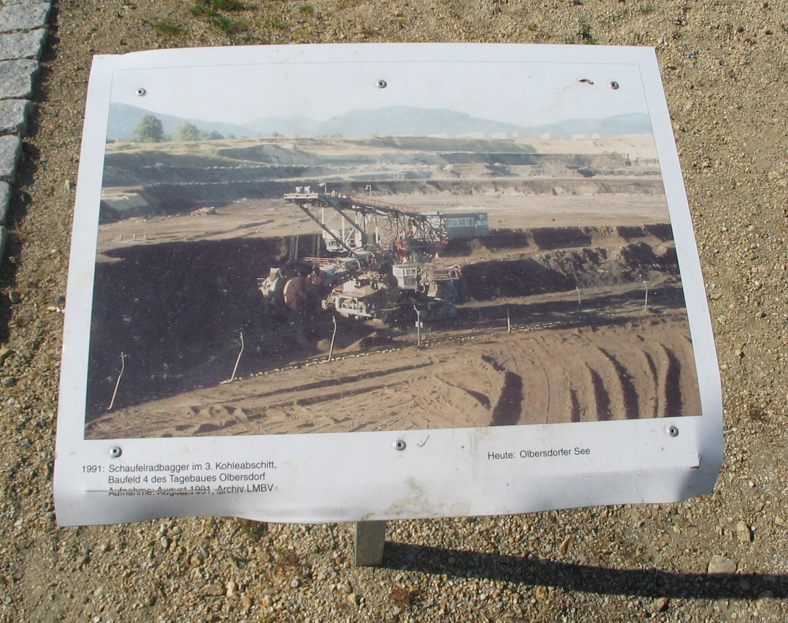 Tafel mit altem Bagger am Tagebau Olbersdorf